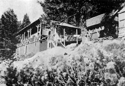 Majlát-menedékház.jpg